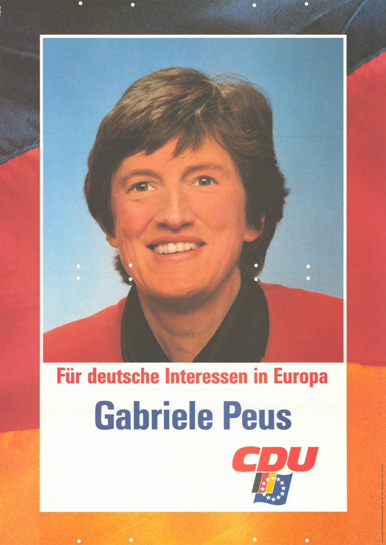 Für deutsche Interessen in Europa Gabriele Peus CDUAbbildung:Porträtfoto - NationalfarbenPlakatart:Kandidaten-/Personenplakat mit PorträtAuftraggeber:Verantw.: CDU-Bundesgeschäftsstelle, Abt. Öffentlichkeitsarbeit, Konrad-Adenauer-Haus, BonnDrucker_Druckart_Druckort:KVD, KölnObjekt-Signatur:10-030 : 224Bestand:Europawahlplakate (10-030)GliederungBestand10-18:Europawahlplakate (10-030) » CDULizenz:KAS/ACDP 10-030 : 224 CC-BY-SA 3.0 DE